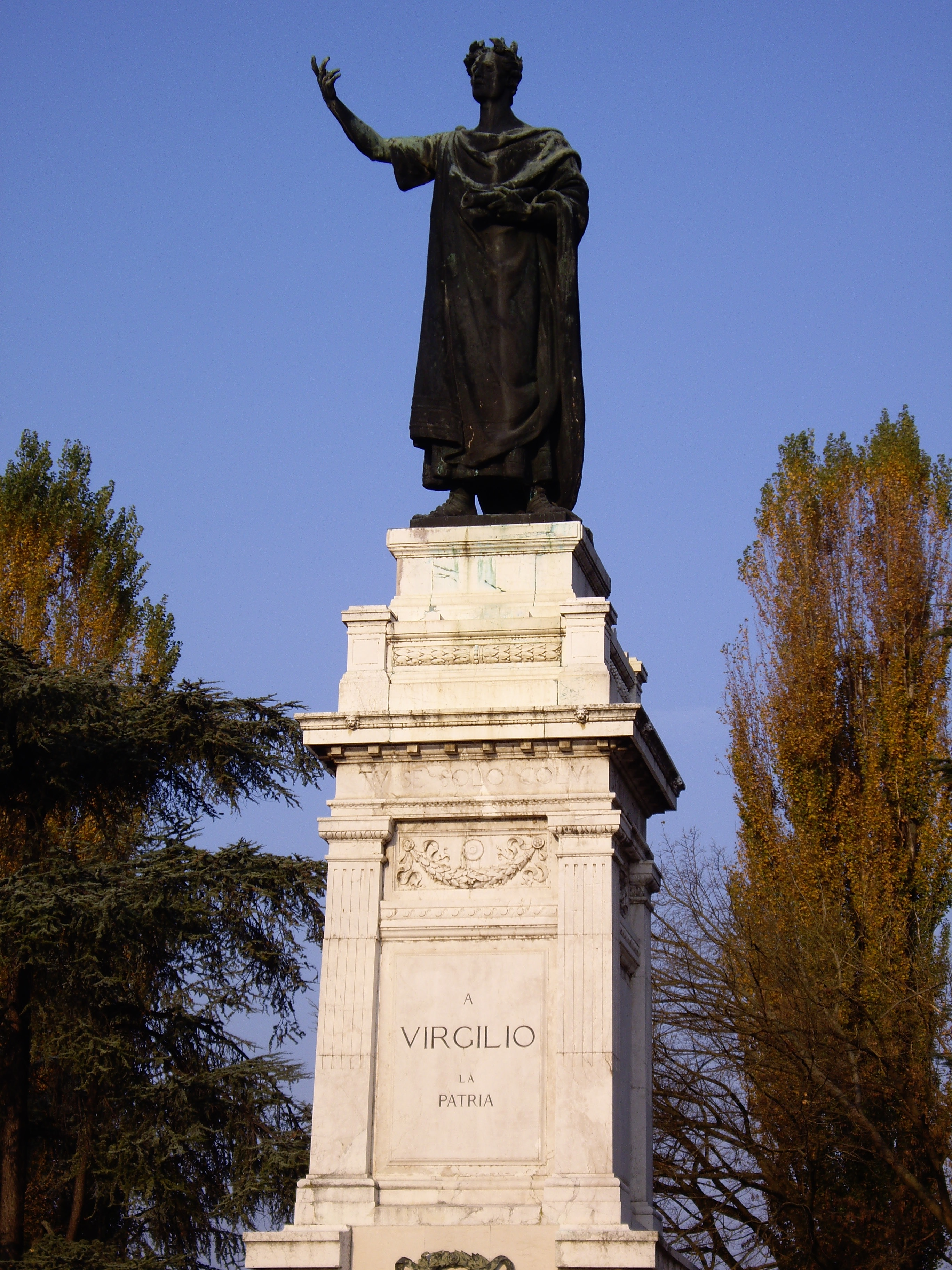 Virgil, the monument in the Piazza Virgiliana, Mantova